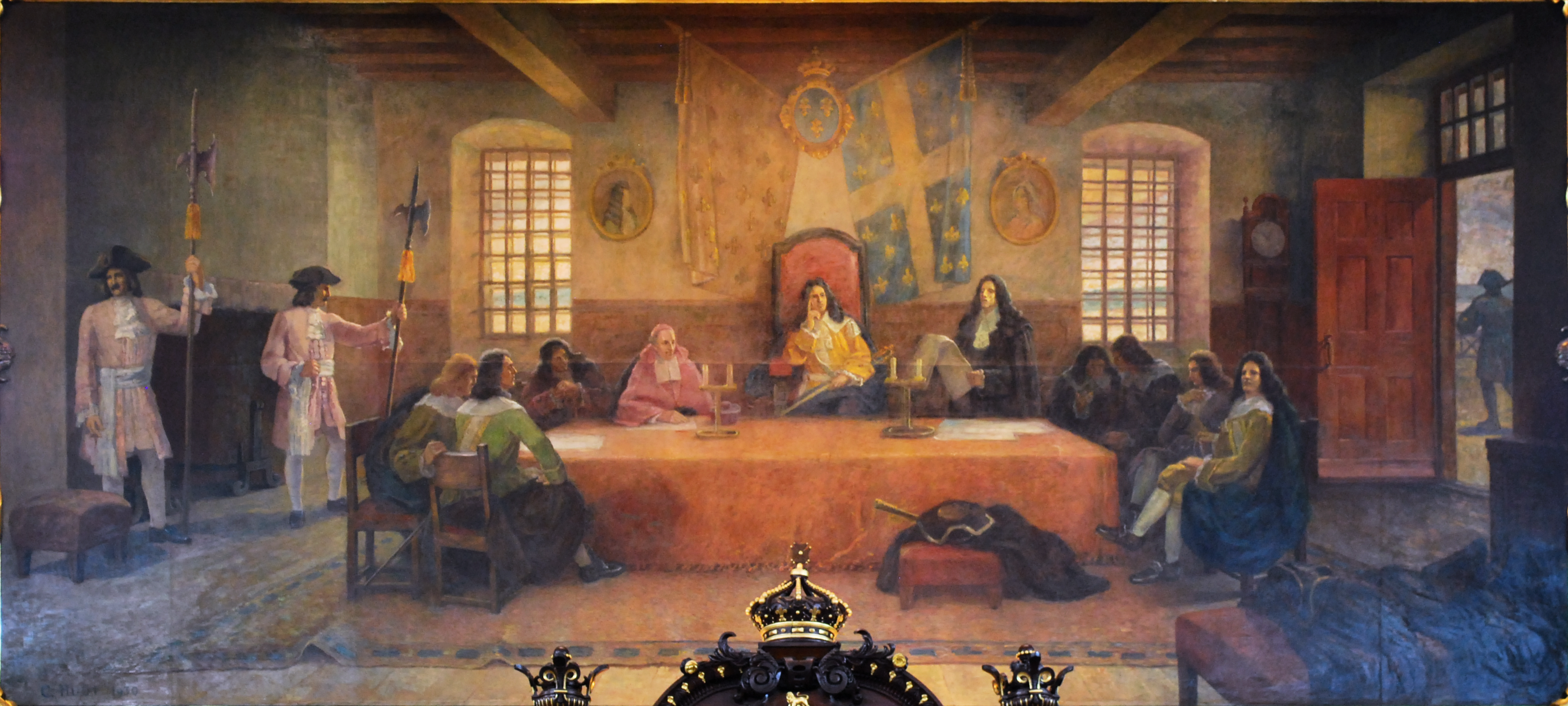 Le Conseil souverain de Charles Huot. Tableau sur un mur du salon rouge de l'hôtel du Parlement, à Québec. Huile sur toile, environ 3,9 m x 8,7 m.